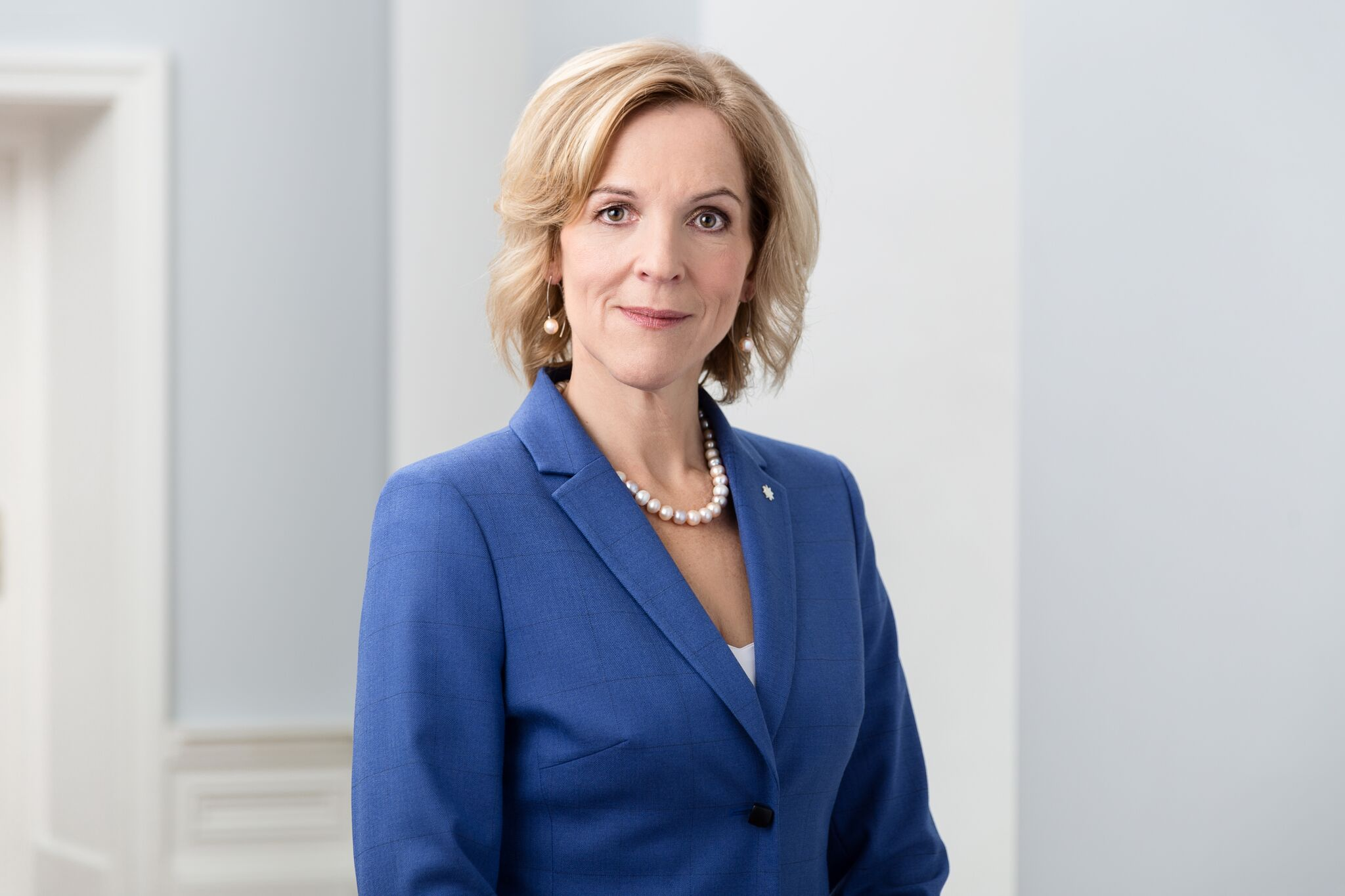 Kaia Iva